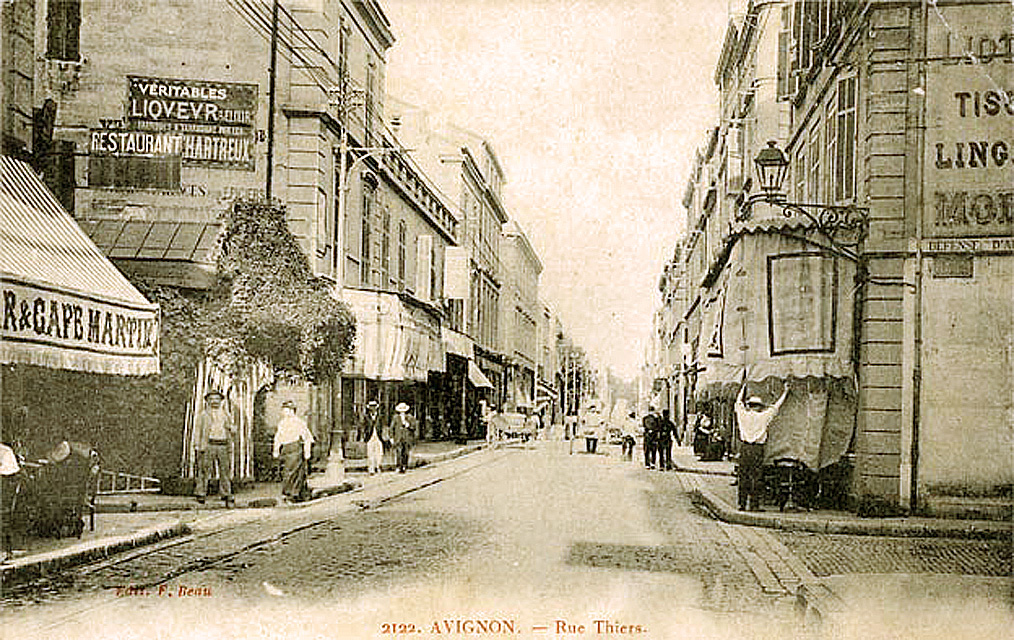 Vue de la Rue Thiers d'Avignon depuis la Place Pie